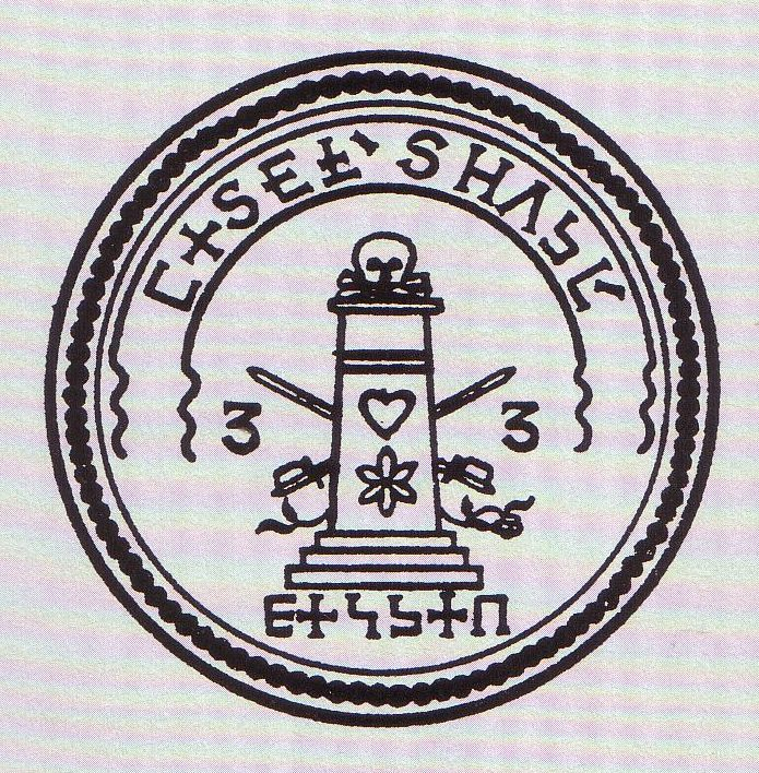 Siegel des Unitistenordens